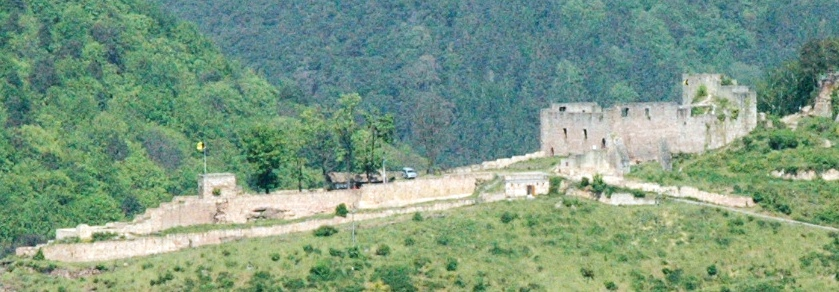 Burgruine Wolfsburg in Neustadt a.d. Weinstraße vom Zigeunerfelsen aus gesehen.